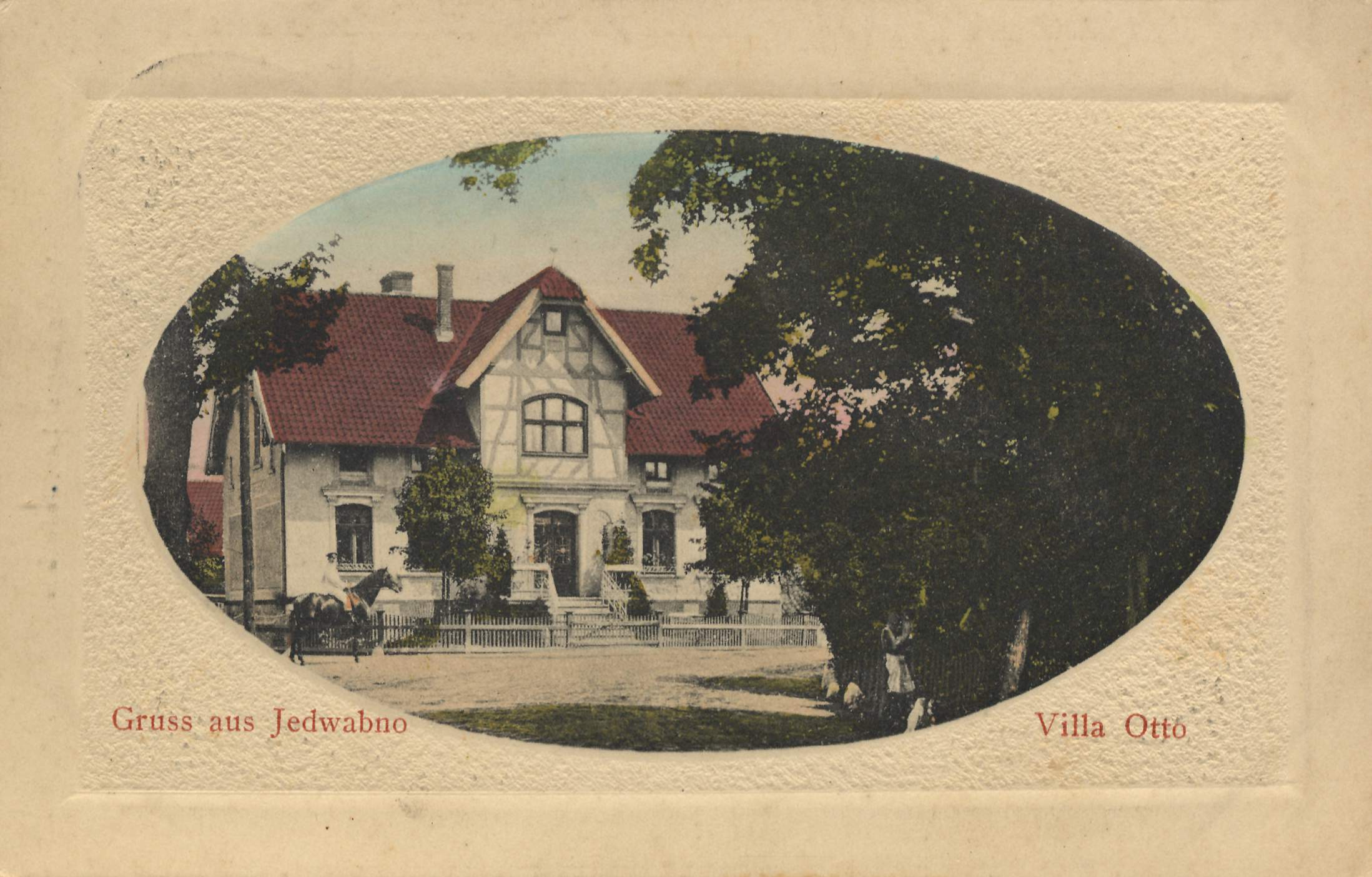 Villa Otto